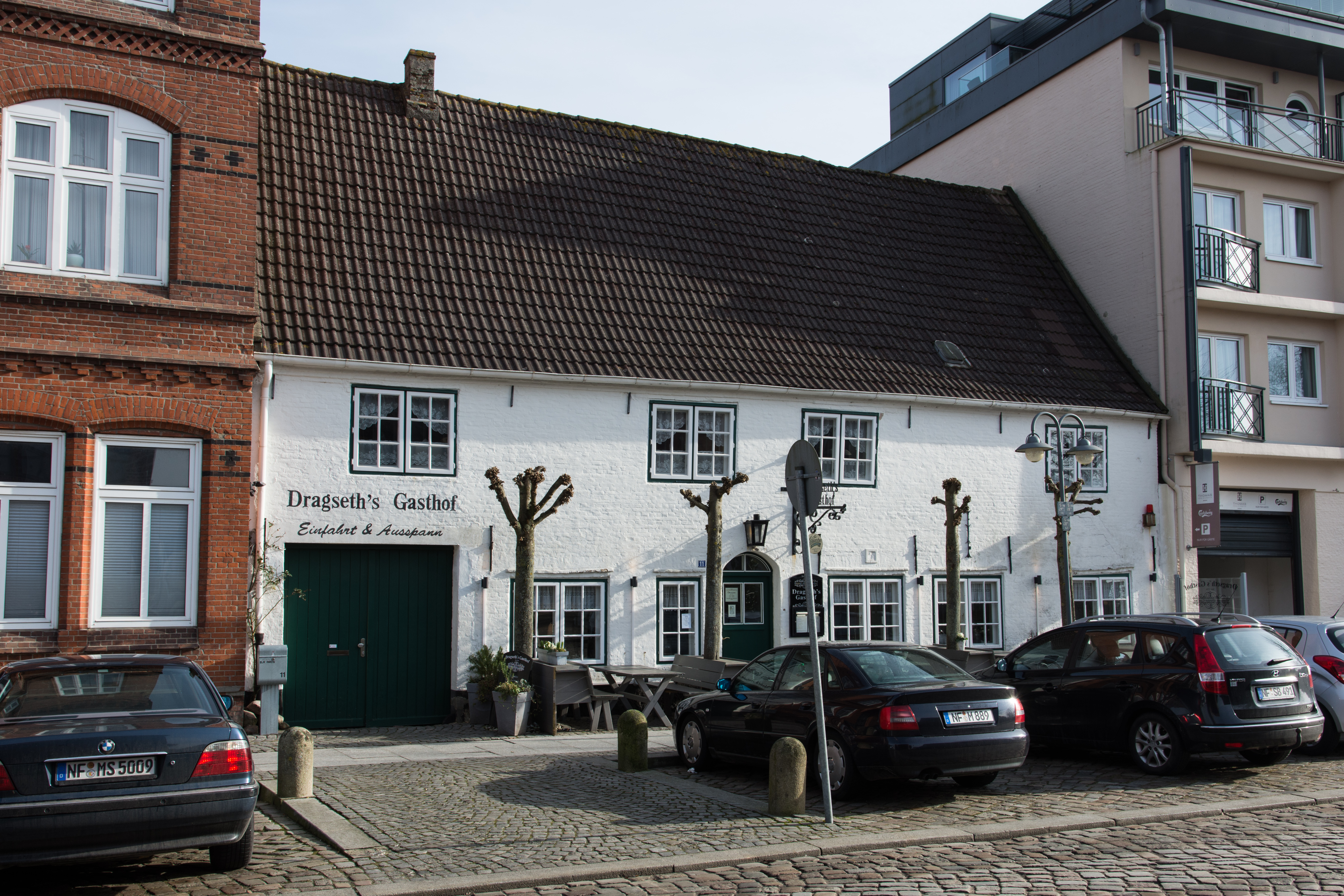 Husums ältester Gasthof.